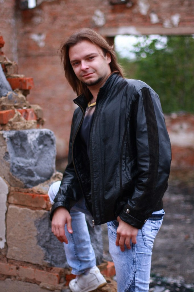 фото Михаила Бугаева (основатель и гитарист группы Гран-КуражЪ)